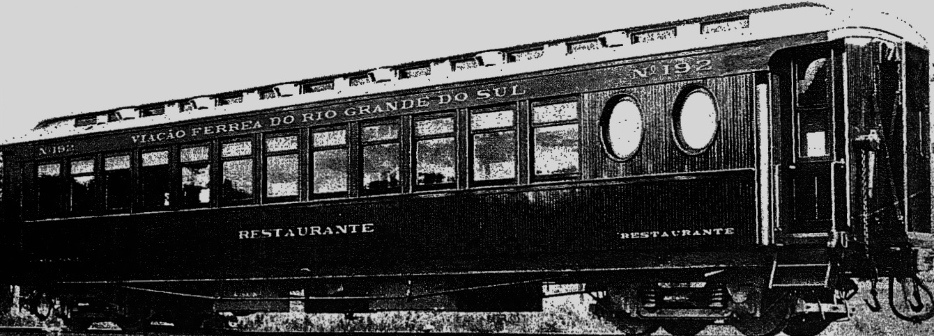 Vagão-restaurante da Viação Férrea do Rio Grande do Sul (c.1925).